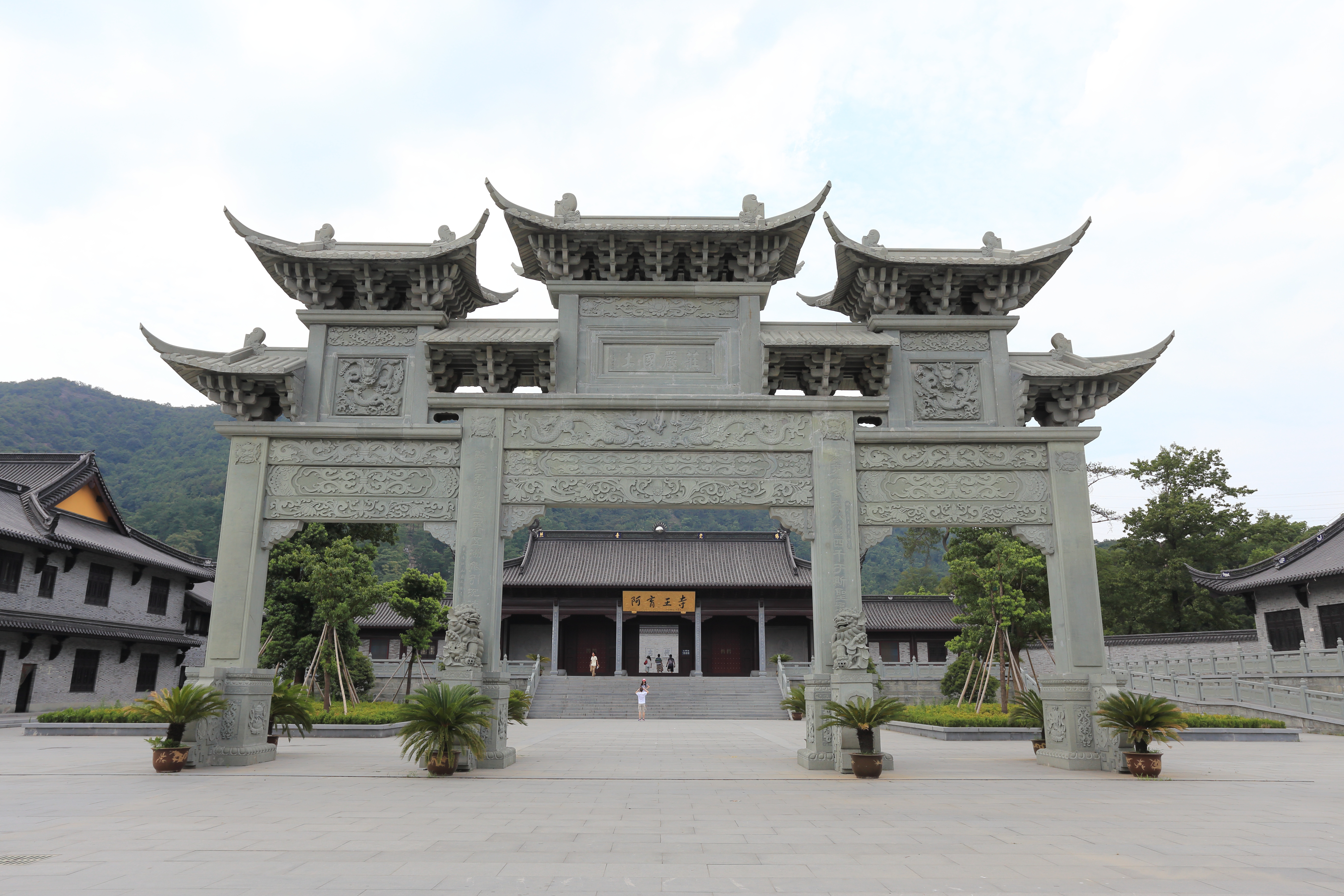 宁波阿育王寺 —— 新建的牌坊